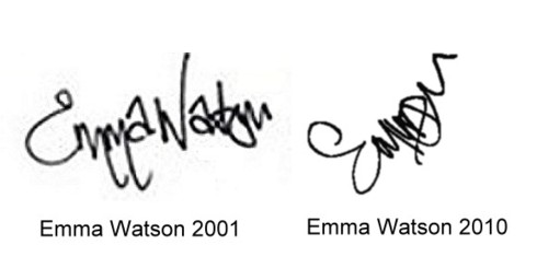 Assinatura da atriz Emma Watson